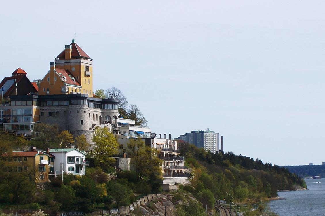 Hotel Foresta, Lidingö Sweden